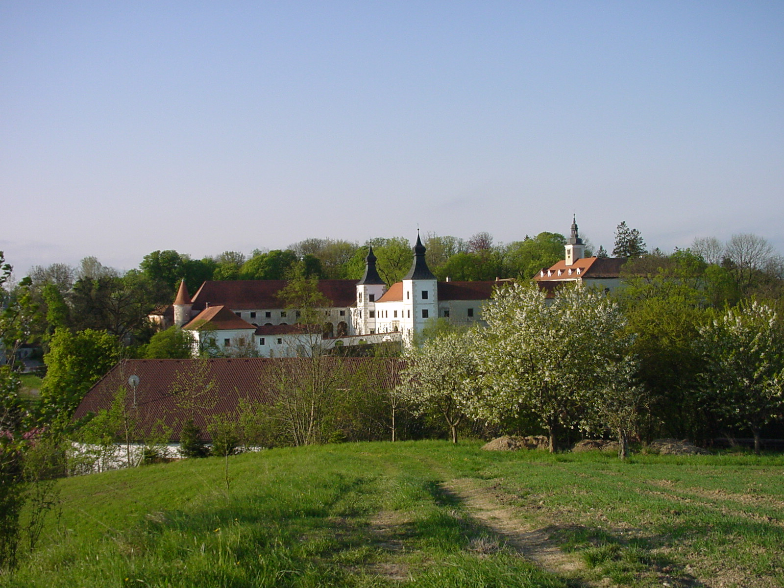 Das Schloss Salaberg von Stadt Haag aus gegen Sueden gesehen.